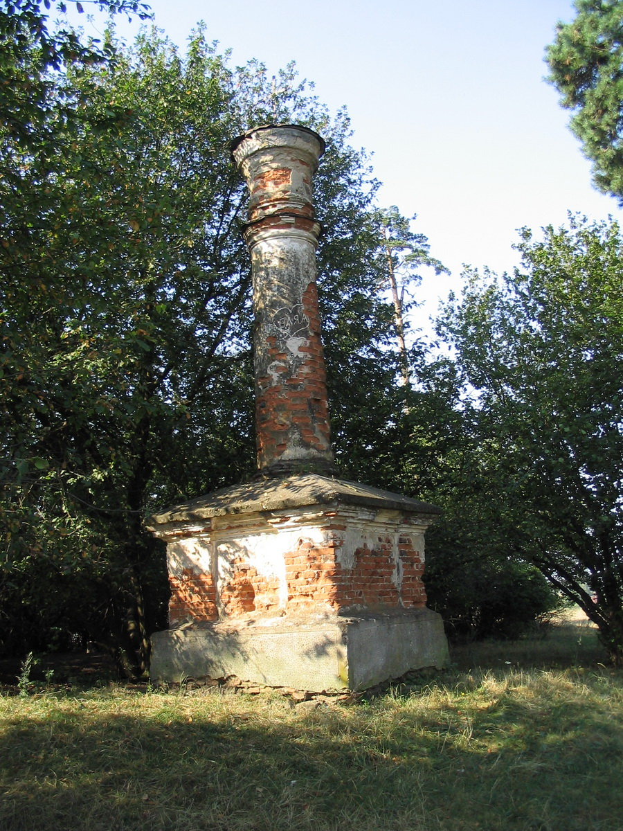 Беларуская (тарашкевіца): Памятны знак Канстытуцыі Рэчы Паспалітай 3 траўня 1791 г.